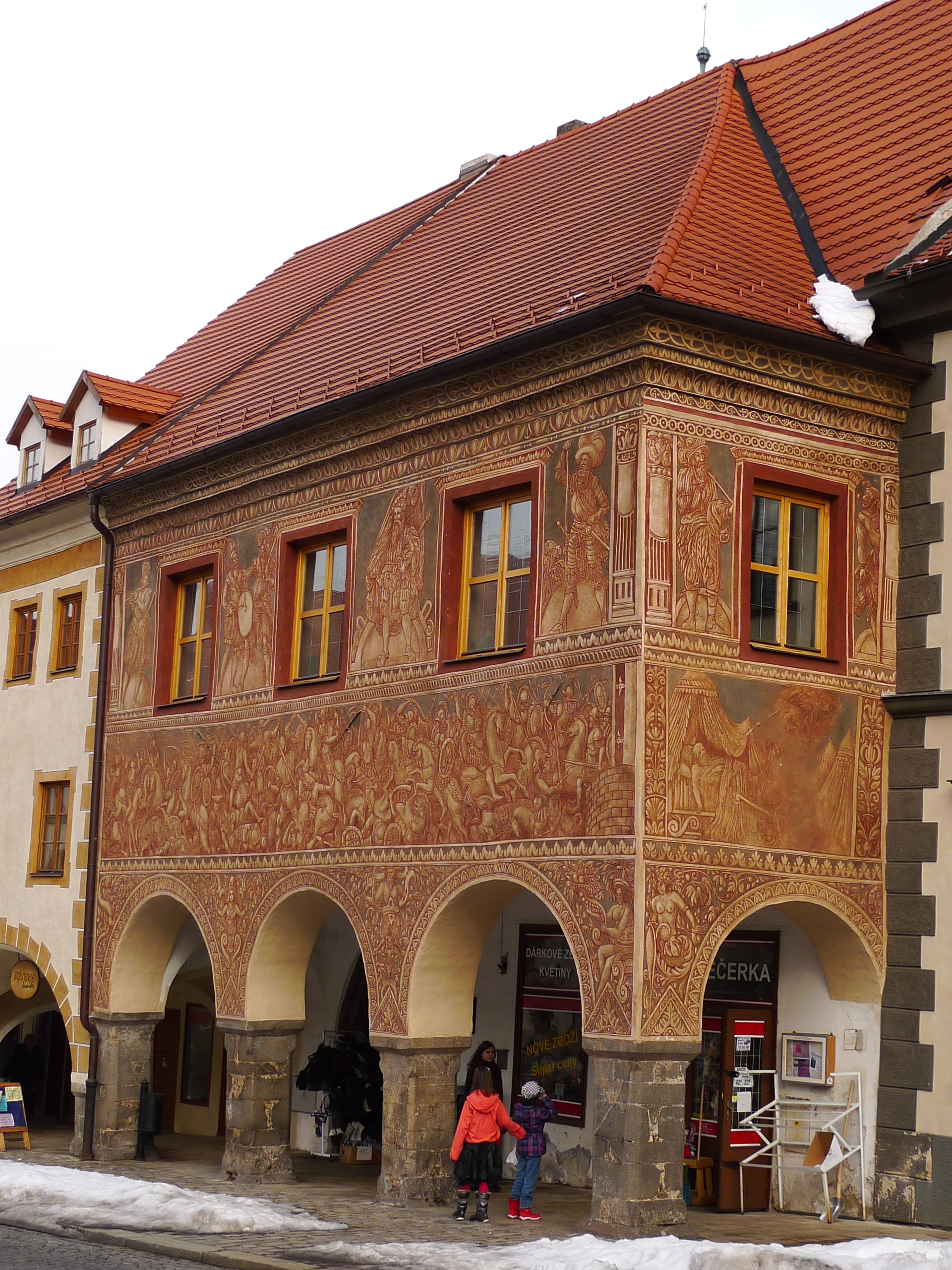 Měšťanský dům tzv. Rumpálův dům (Prachatice), Velké nám. 41, Prachatice